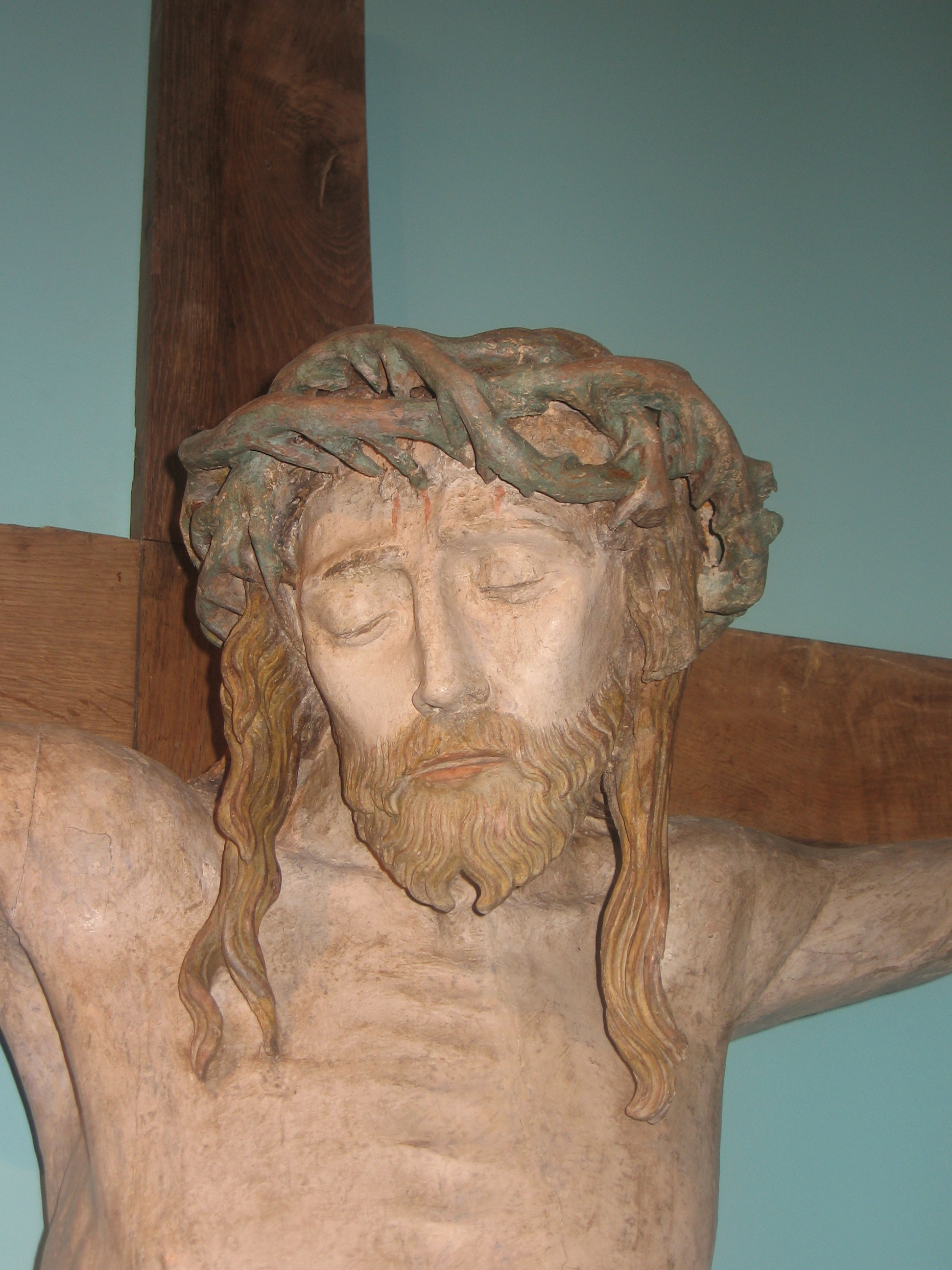 Exposition "Le Beau XVIe siècle". Le Christ en Croix Maître de Chaource. Premier quart du XVIe siècle. Bois polychromé. Feuges (Aube) Classé Monument historique le 20.12.1911